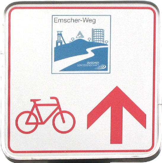 Kennzeichnung des Emscher-Radweg